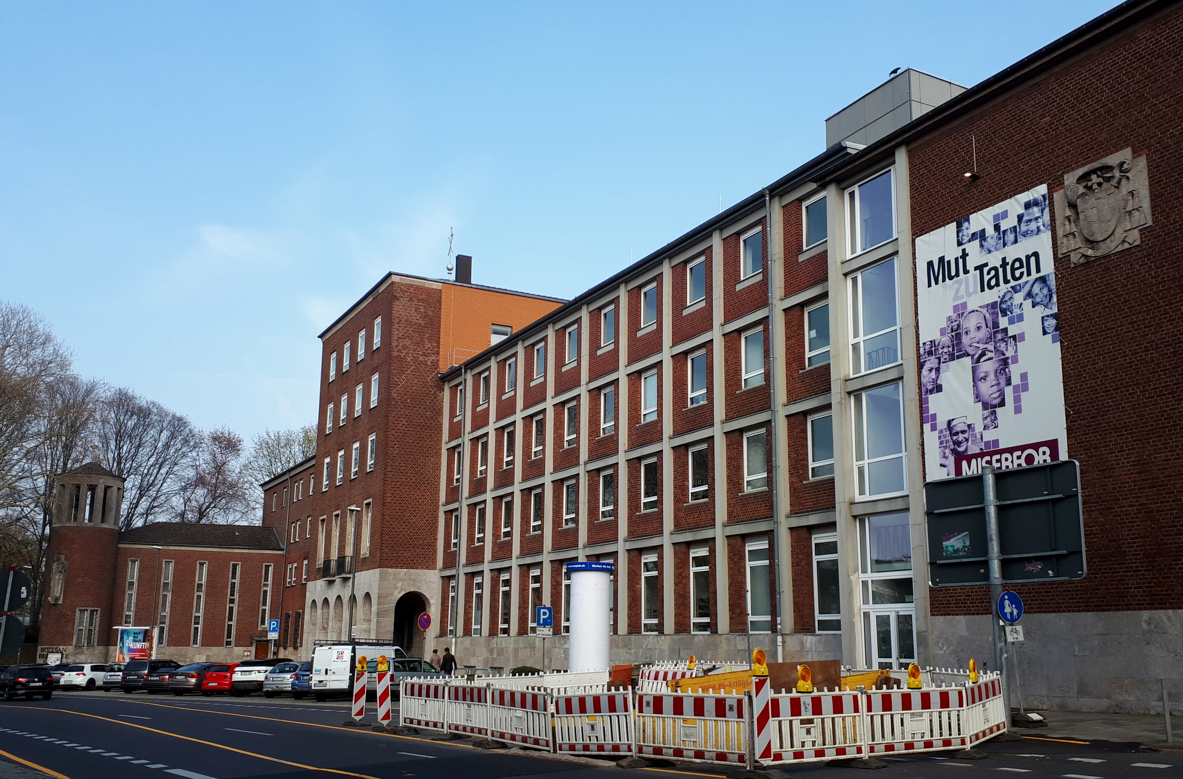 MISEREOR-Hauptgebäude in Aachen